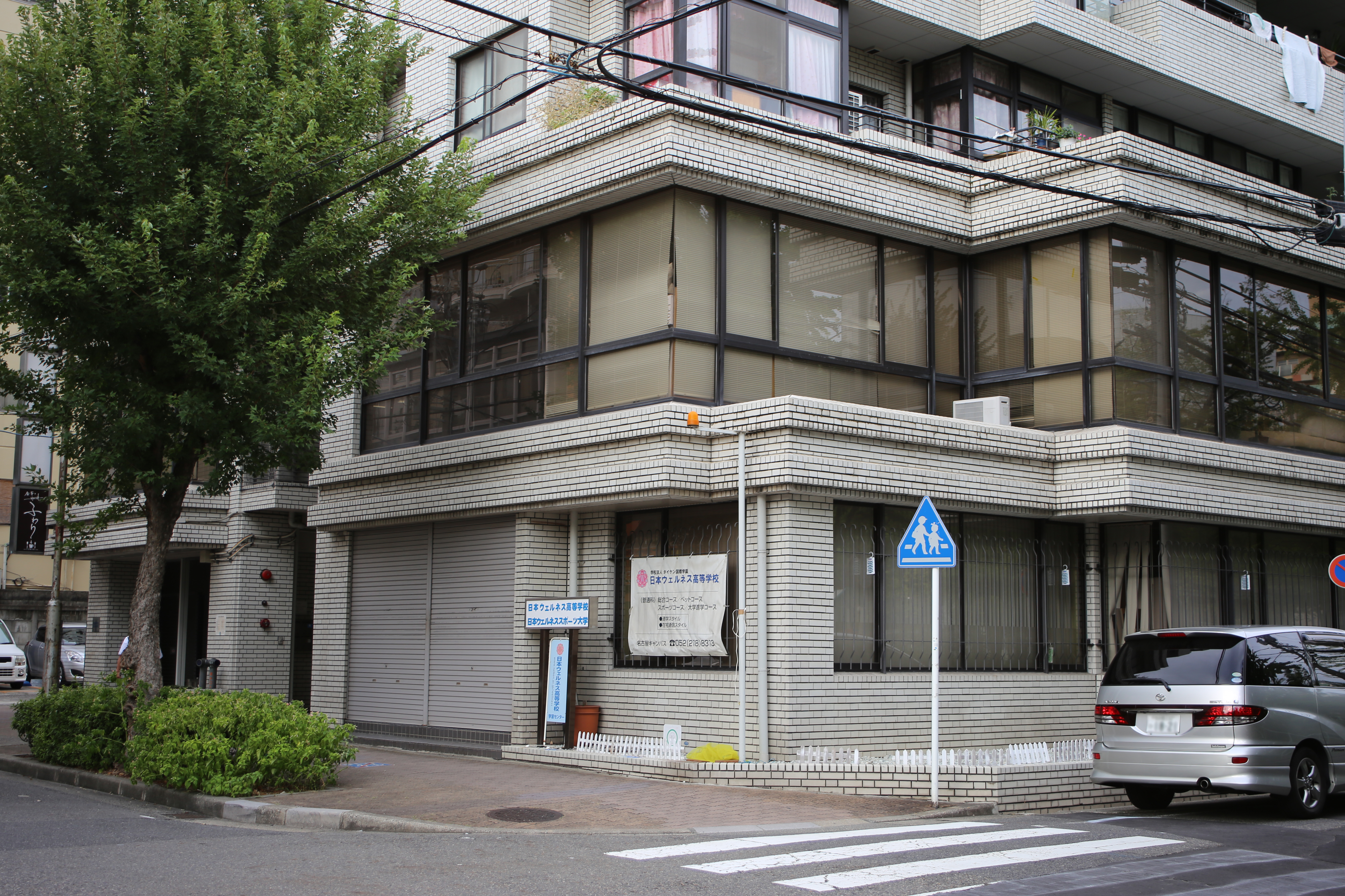 名古屋市中区栄一丁目の名古屋ウェルネススポーツカレッジを西側公道南側より撮影。ナンバープレートにつき画像処理済